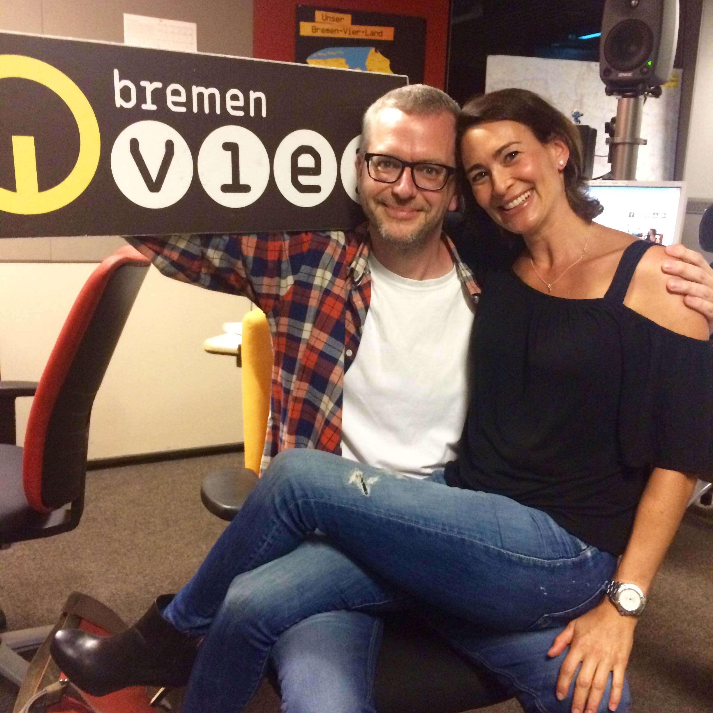 Eske Wunder war am 4. September 2016 zu Gast bei Radio Bremen 4 in der Sendung "Club Juk". Wie kam es eigentlich zu dem Song "ABRA CADABRA" und viele Fragen mehr....